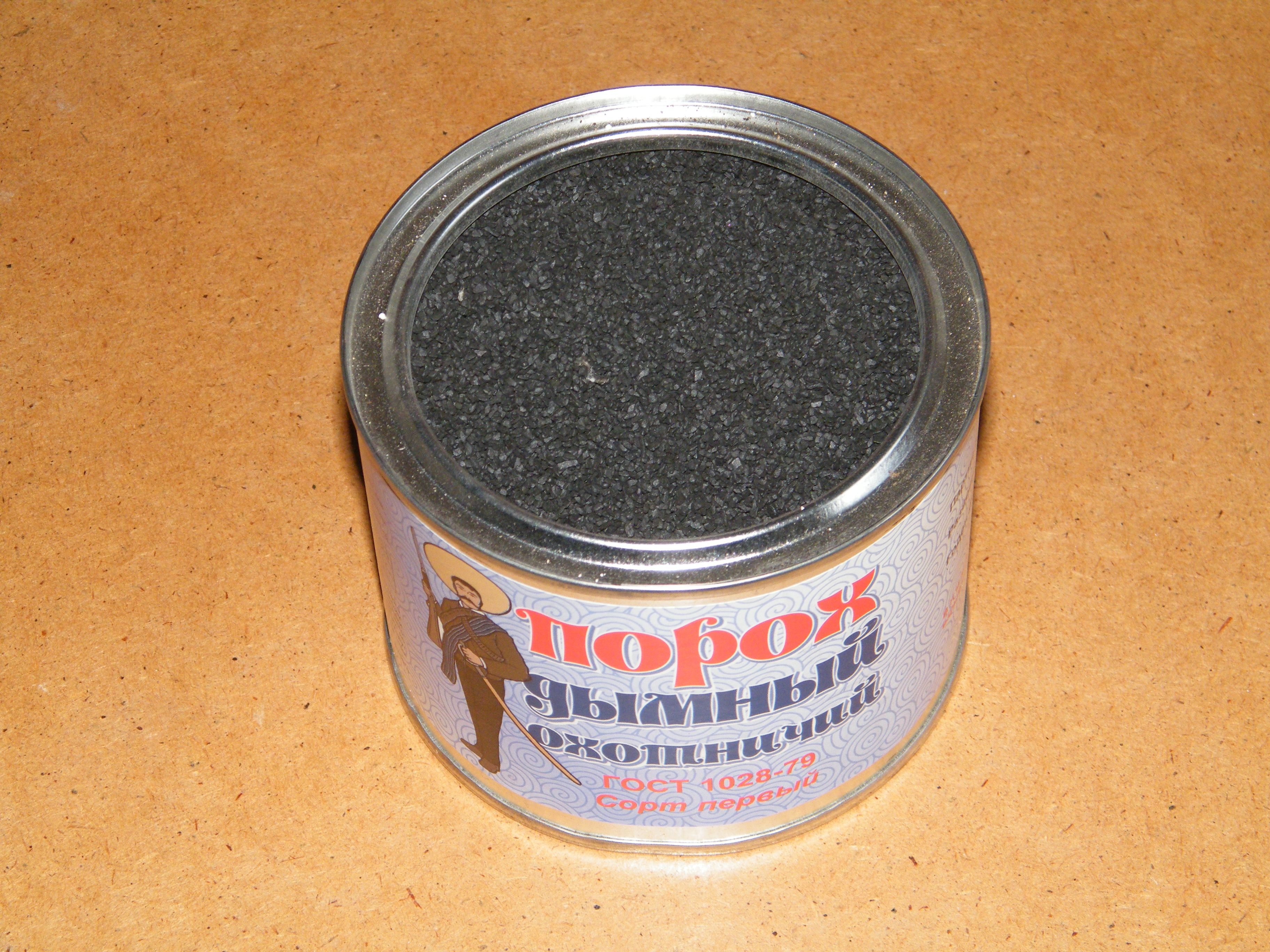 Дымный порох (Россия)